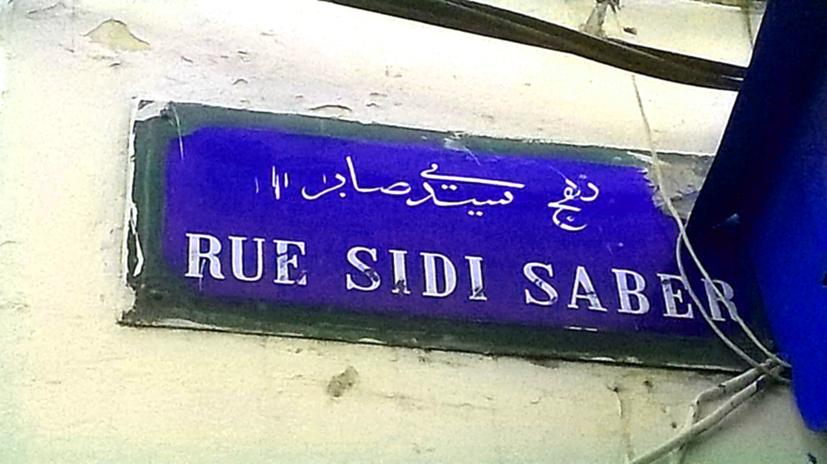 La médina de Tunis مدينة تونس العتيقة